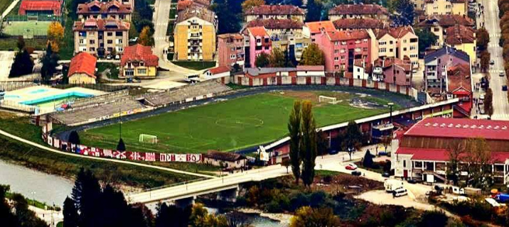 Gradski stadion u Priboju